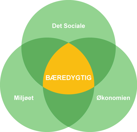 3 søjler